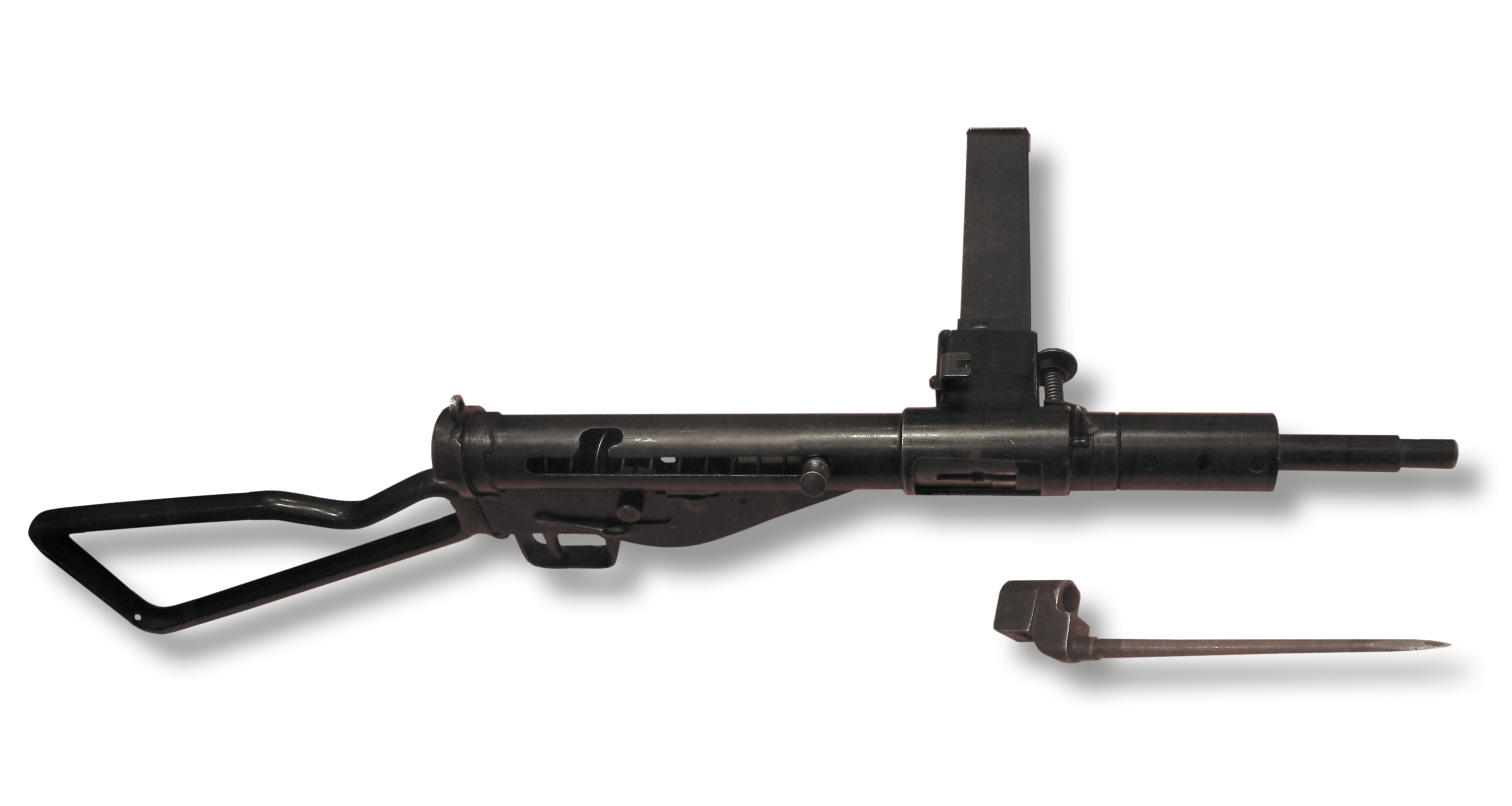 Britische Maschinenpistole Sten Mk II mit sogenannter "Skelettschulterstütze" und Tüllenbajonett (zum Aufstecken auf die Laufmündung)